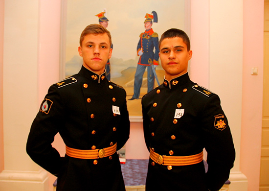 Кадеты Кронштадтского морского кадетского корпуса